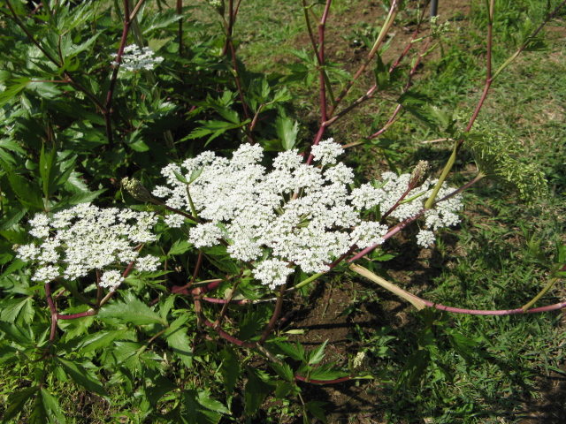 Angelica acutiloba - 01